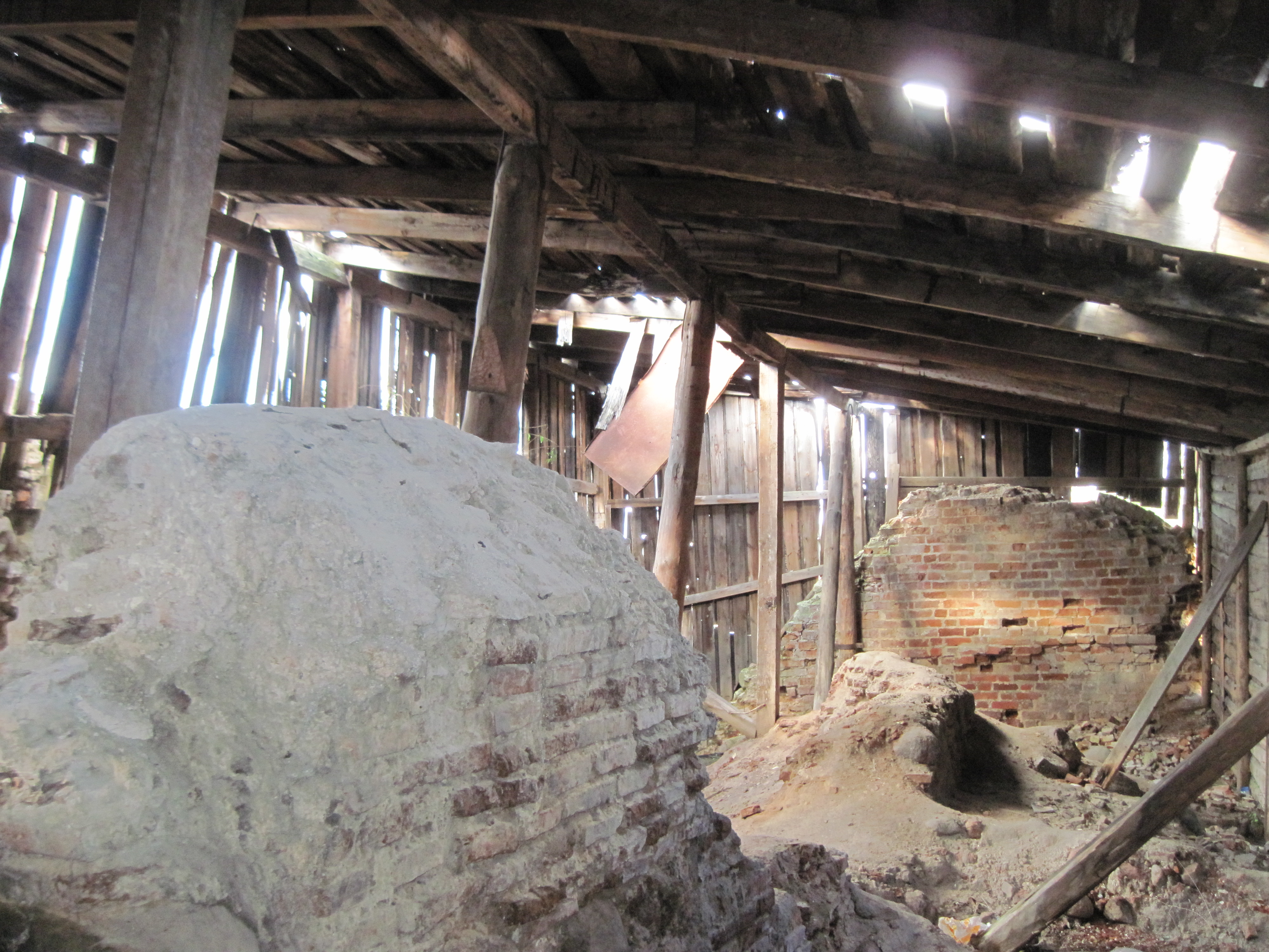 Княжаскі хорам. Рэшткі. Стары замак. Гродна